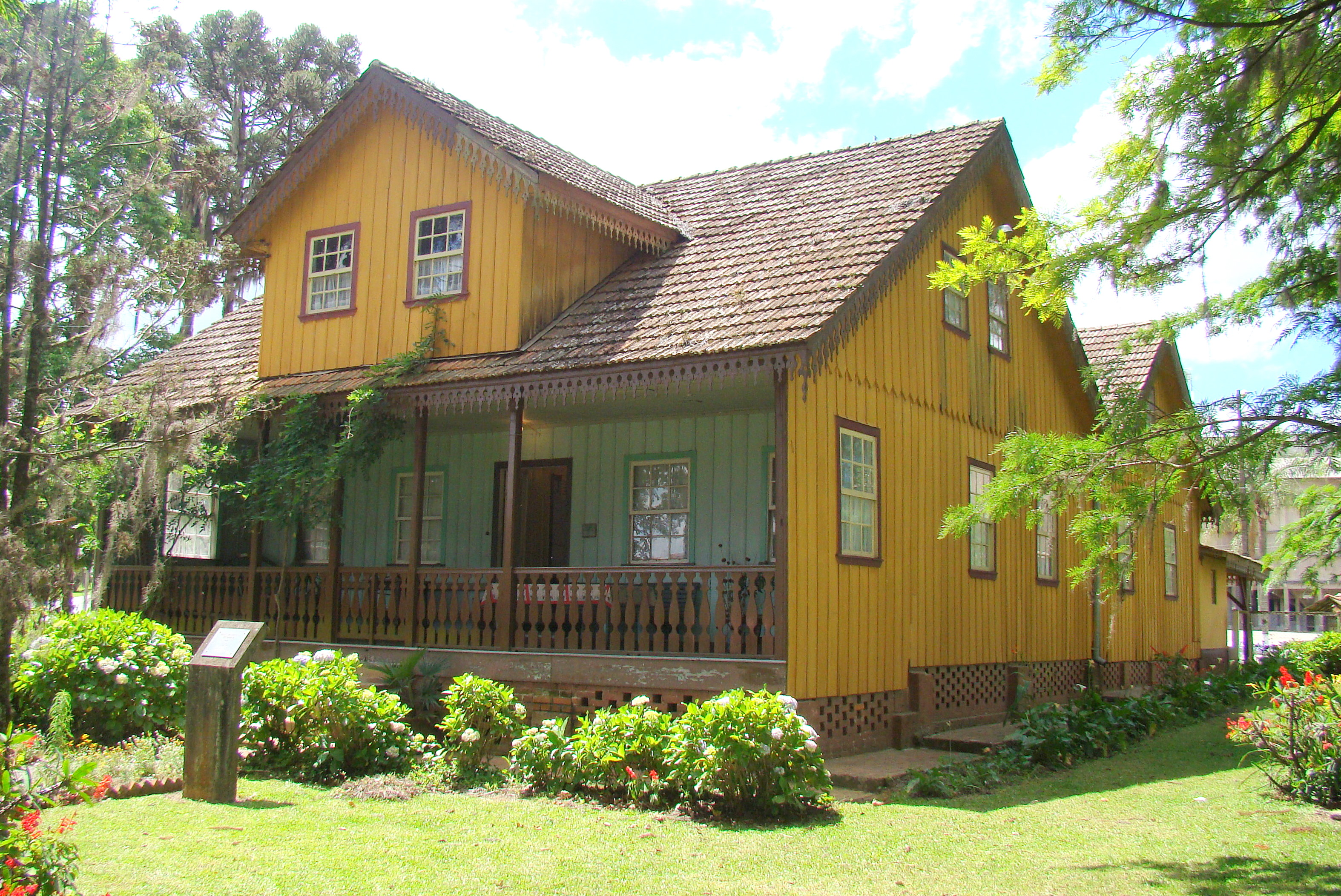 Museu Histórico da Colônia Witmarsum, Paraná, Sul do Brasil.